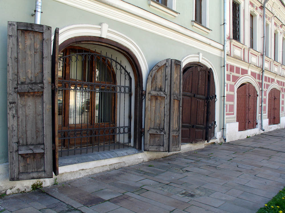 Shkolnaya Street, Moscow. Shop windows.